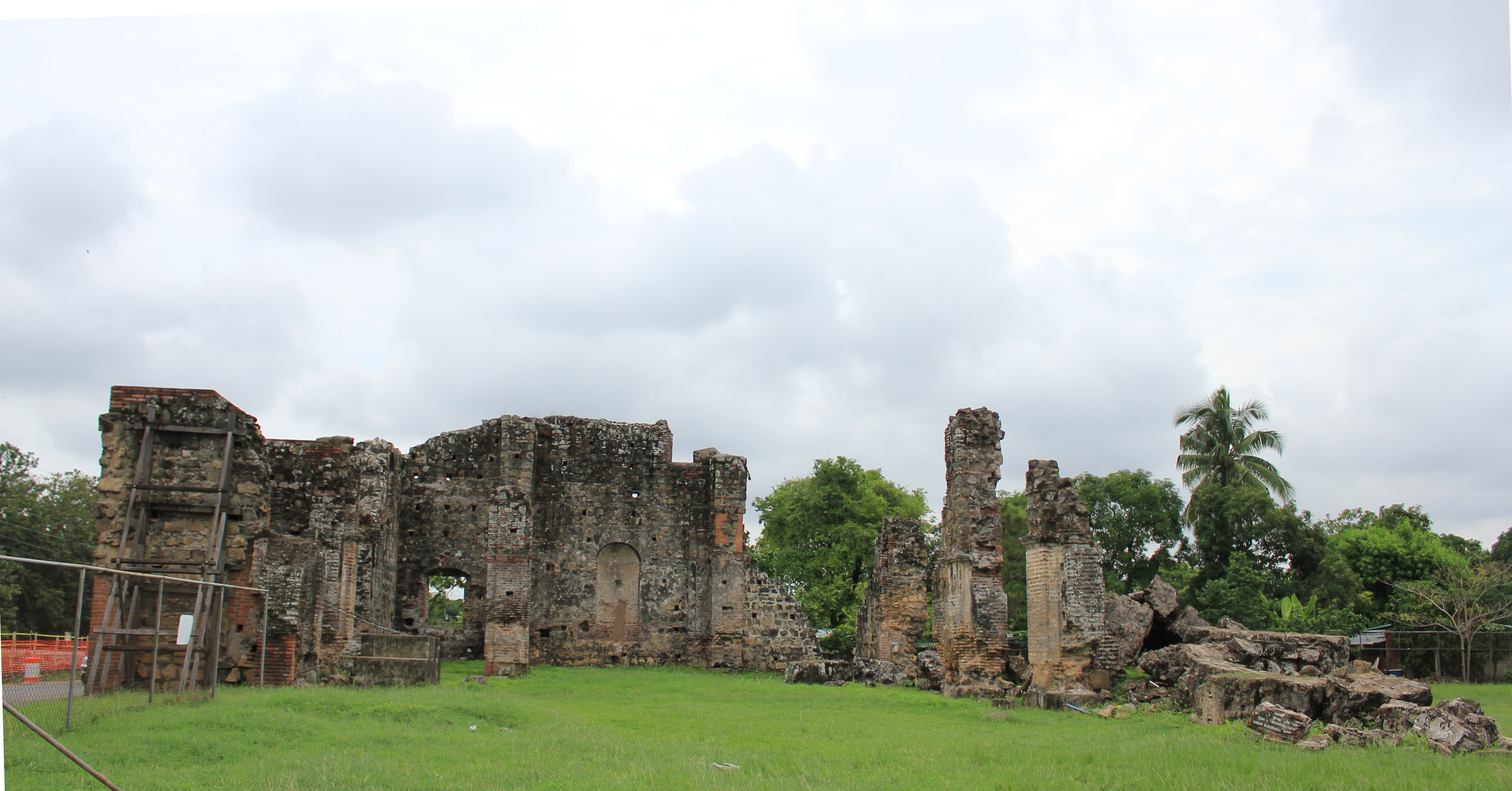 Conjunto Monumental Histórico de Panamá Viejo, Panamá. Declarado Patrimonio de la Humanidad por UNESCO.